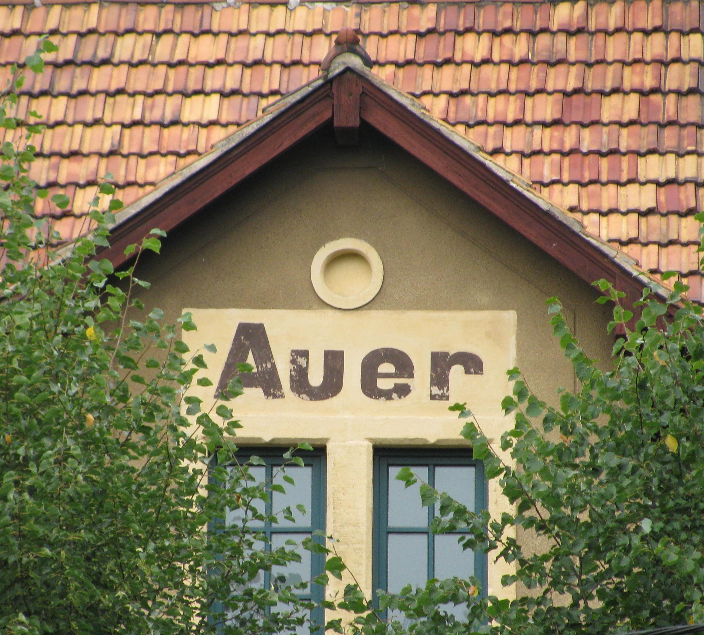 Fassadendetail, Gasthof zum Auer, Moritzburg, Sachsen